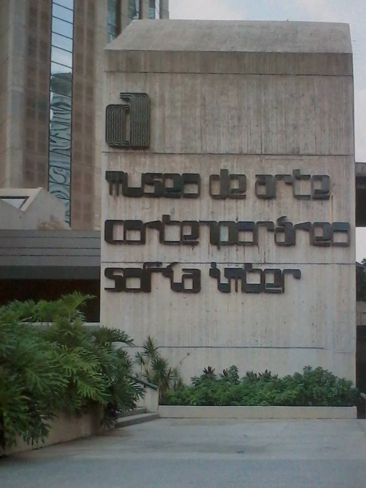 Entrada del museo cuando este aún disponía el nombre de Sofía Imber